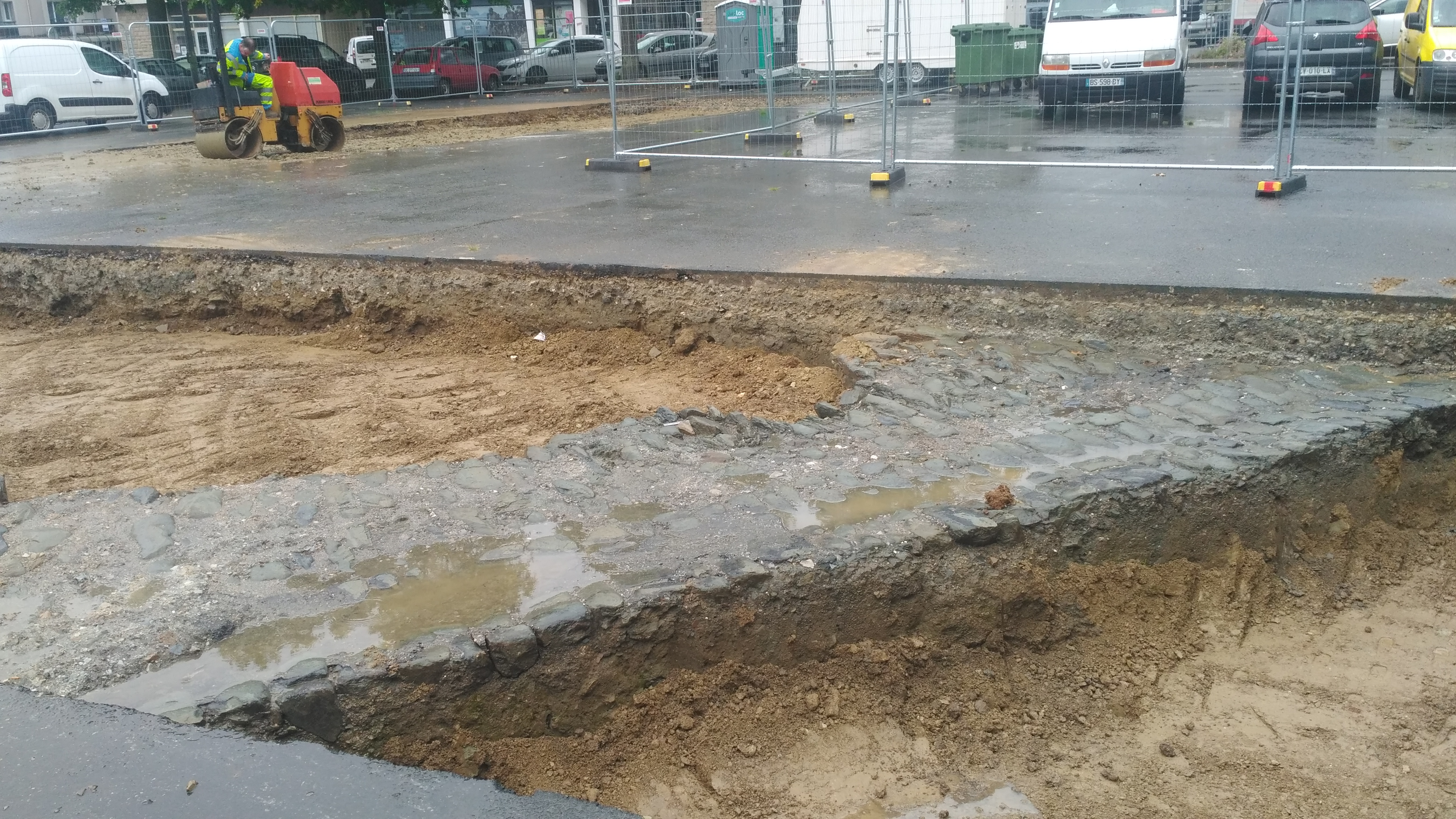 Fouilles archéologiques de la place du Champ de foire à Carhaix, juin 2019. Fin de chantier. Voie pavée, rigole, coupe stratigraphique.